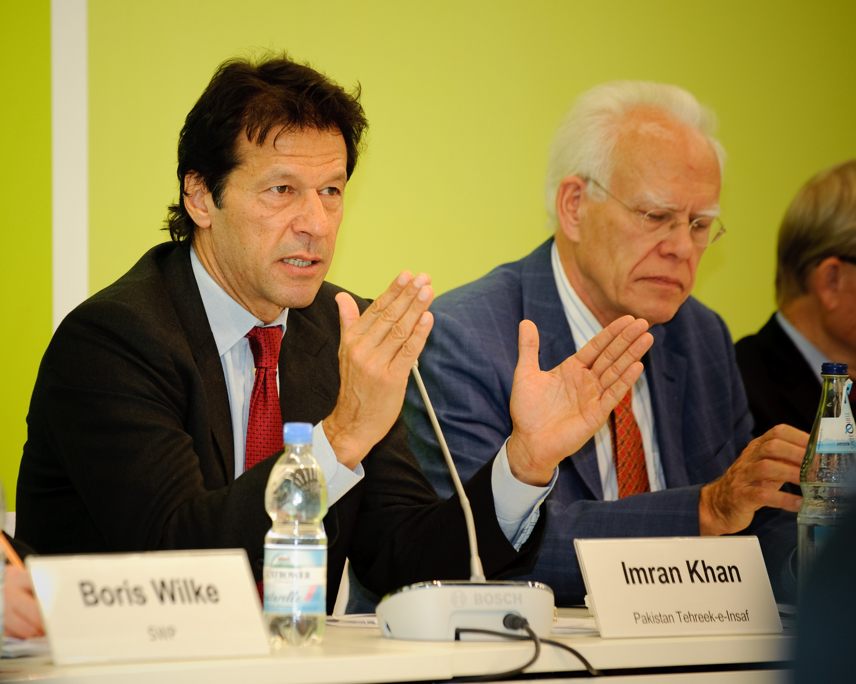 Pakistan ist ein Kriegsgebiet. Es hat neben einer Vielzahl anderer Probleme, die dringend die Etablierung von Rechtsstaatlichkeit und demokratischen Strukturen erfordern, mit großen Bedrohungen von Militanten, Aufständischen und Terroristen zu kämpfen. Im Lichte der derzeitigen Krise diskutierten hochrangige Gäste aus Pakistan und mehrere deutsche Experten über Strukturen und Defizite der Rechtsstaatlichkeit wie auch die derzeitige Sachlage, parallele Rechtssysteme, die Beziehungen zwischen Politik und Judikative und die Rolle politischer Parteien und der Gesellschaft. Die Heinrich-Böll-Stiftung veranstaltete am 26. Oktober 2009 eine Konferenz und Fachdiskussion unter dem Titel "Rule of Law: The Case of Pakistan". Eine Dokumentation finden Sie auf Foto: Stephan Röhl